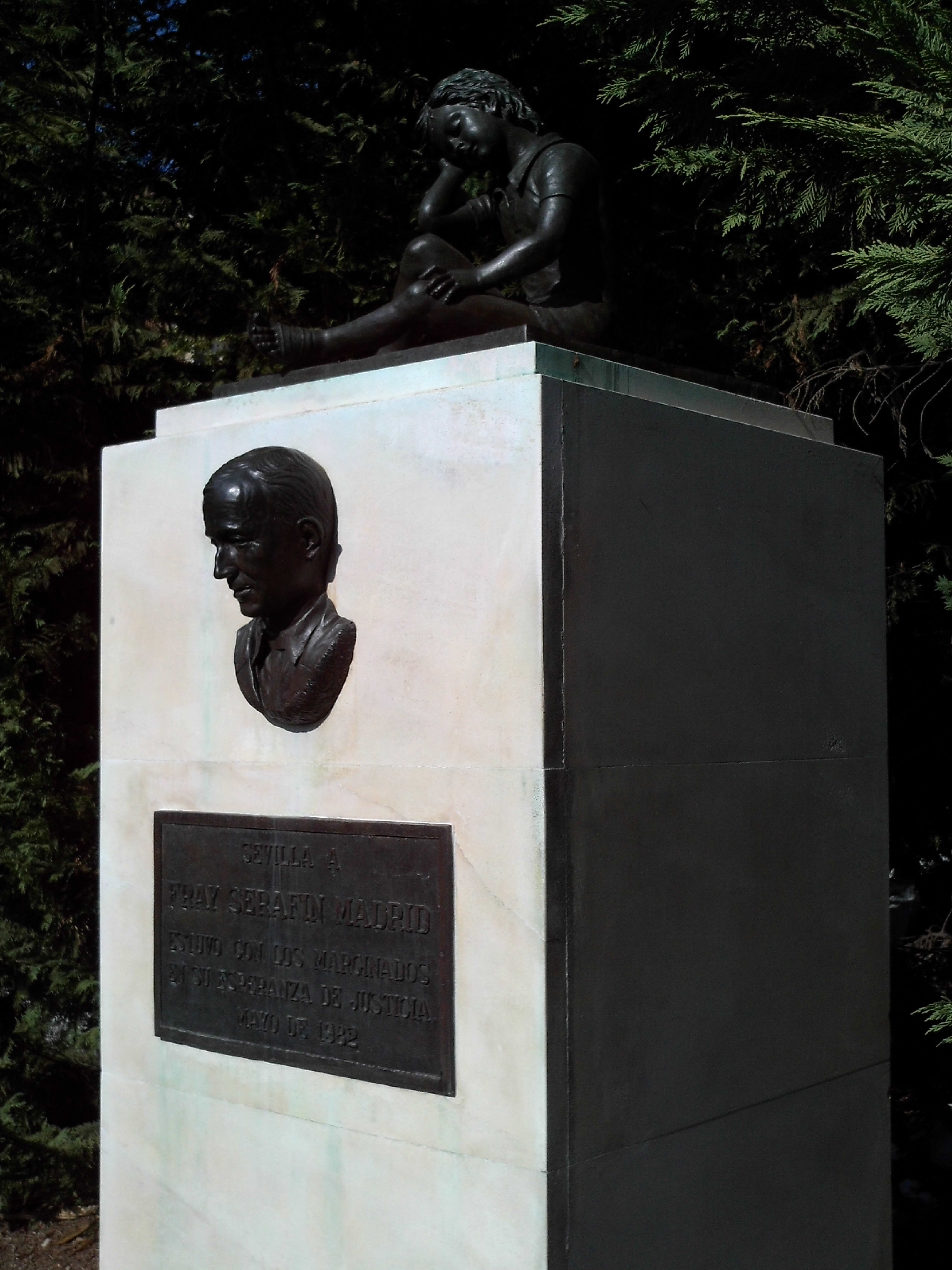 Monumento a Serafín Madrid. Sevilla, Andalucía, España.